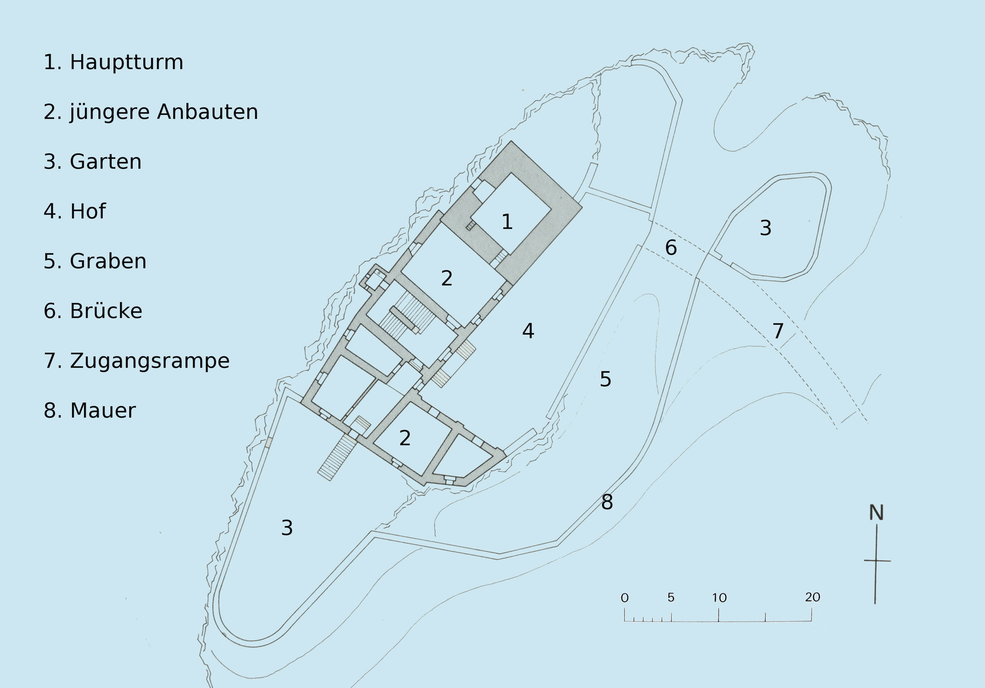 Schloss Baldenstein, Übersichtsplan